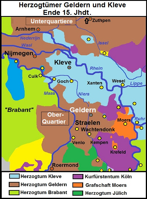 Territorien Herzogtümer Geldern und Kleve 15./16. Jhdt.